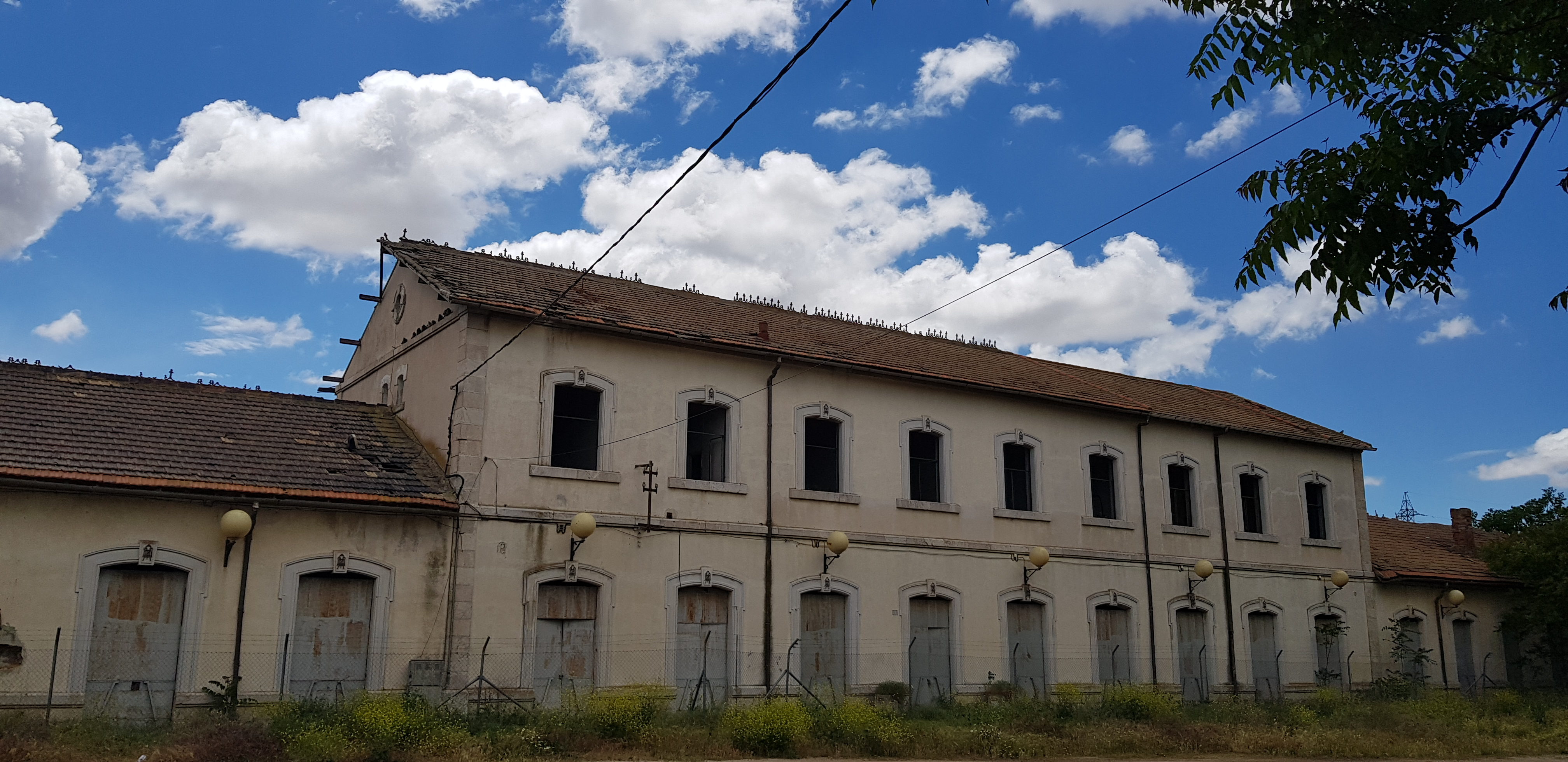 Histórica Estación de Chinchilla, Albacete